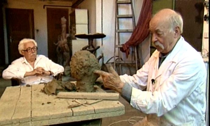 Benczédi Sándor és Méhes György